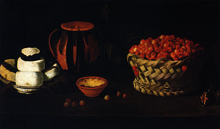 Cesta com Cerejas, Queijos e Barros.label QS:Lpt,"Cesta com Cerejas, Queijos e Barros."